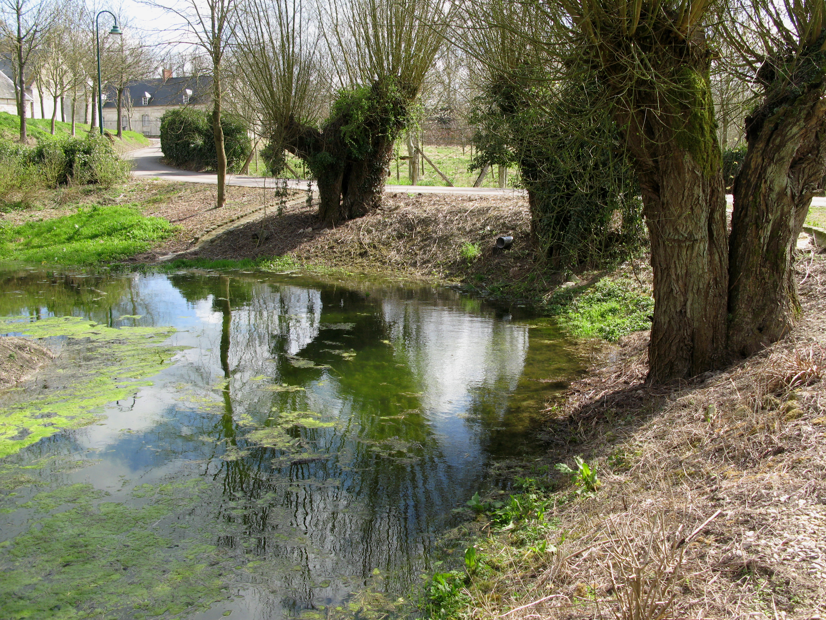 Vadencourt (Somme, France) - La mare en contrebas de l'église et du cimetière. On aperçoit ici le château.